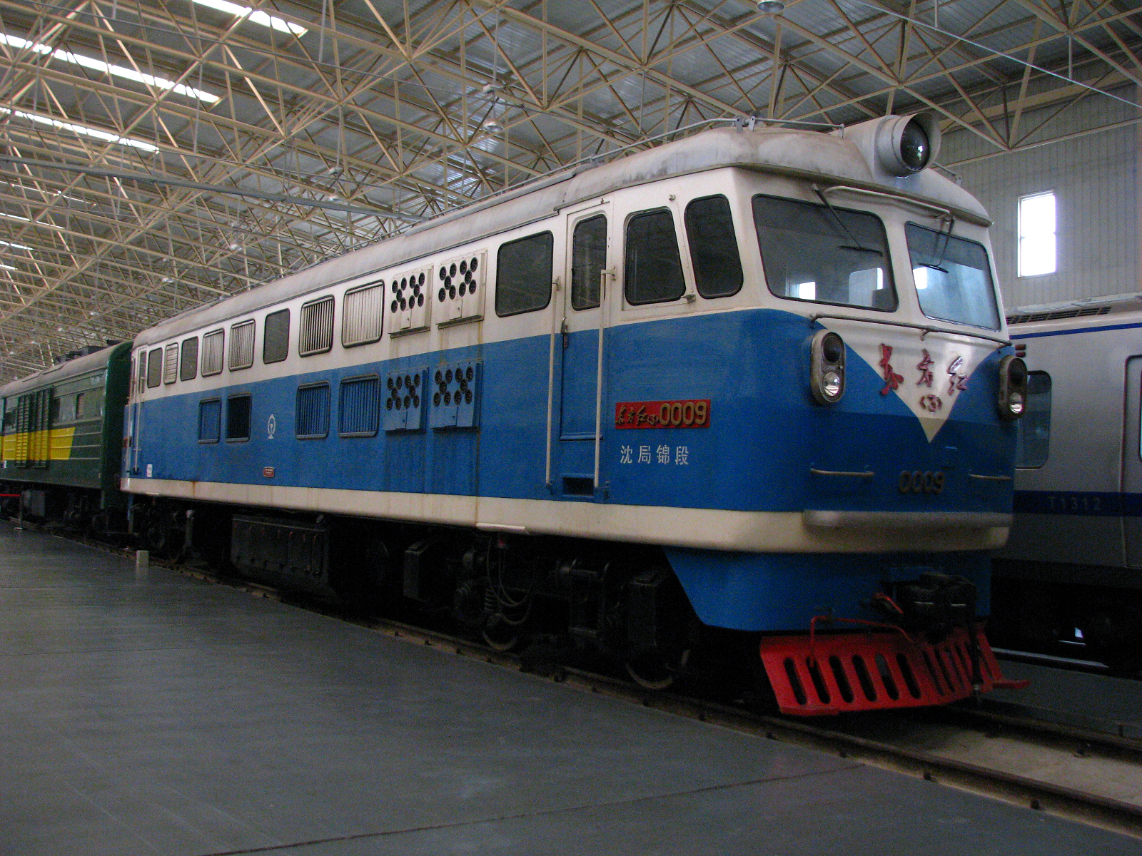 收藏于中国铁道博物馆的东方红3型液力传动内燃机车